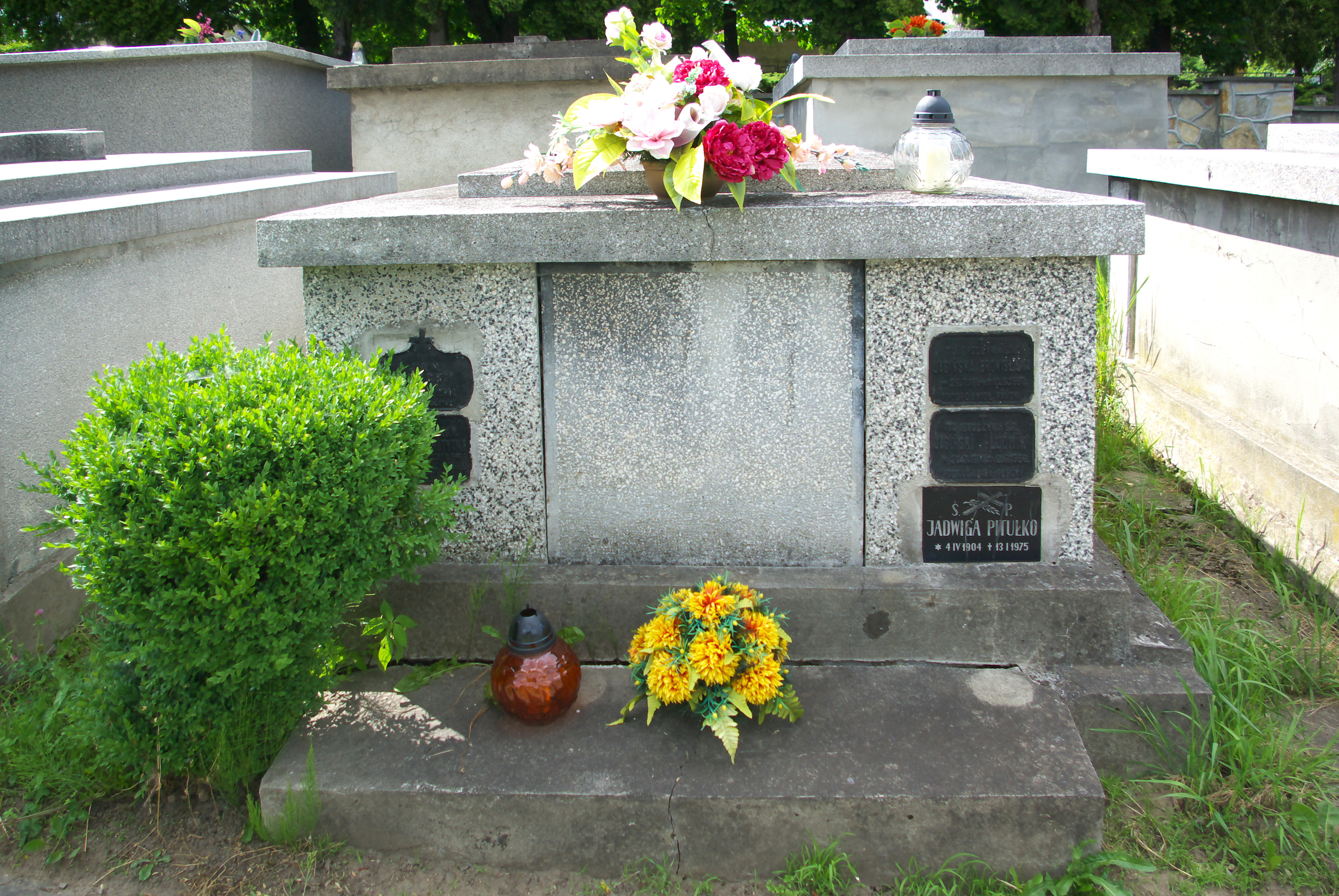 Grobowiec rodzin Batyckich i Jasińskich na Cmentarzu Centralnym w Sanoku.